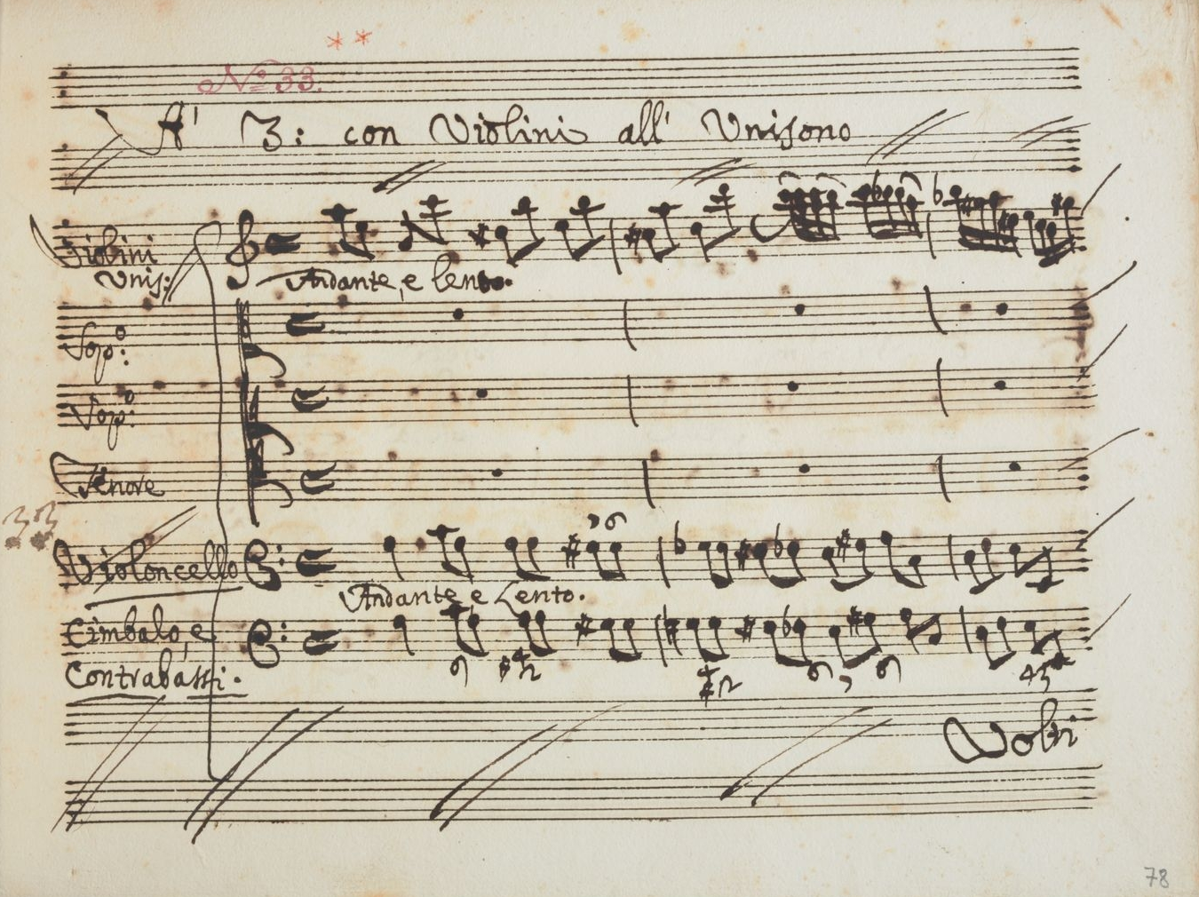 La première page du trio final de l'opéra « Carlo re d'Allemagna » d'Alessandro Scalatti, 1716 (Ms. SA.68.D.95 conservé à Vienne).